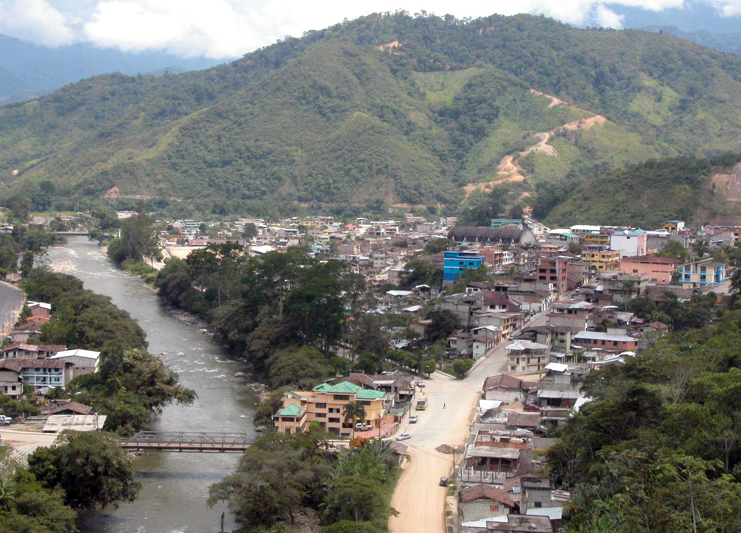 Panorámica de la ciudad de Zamora